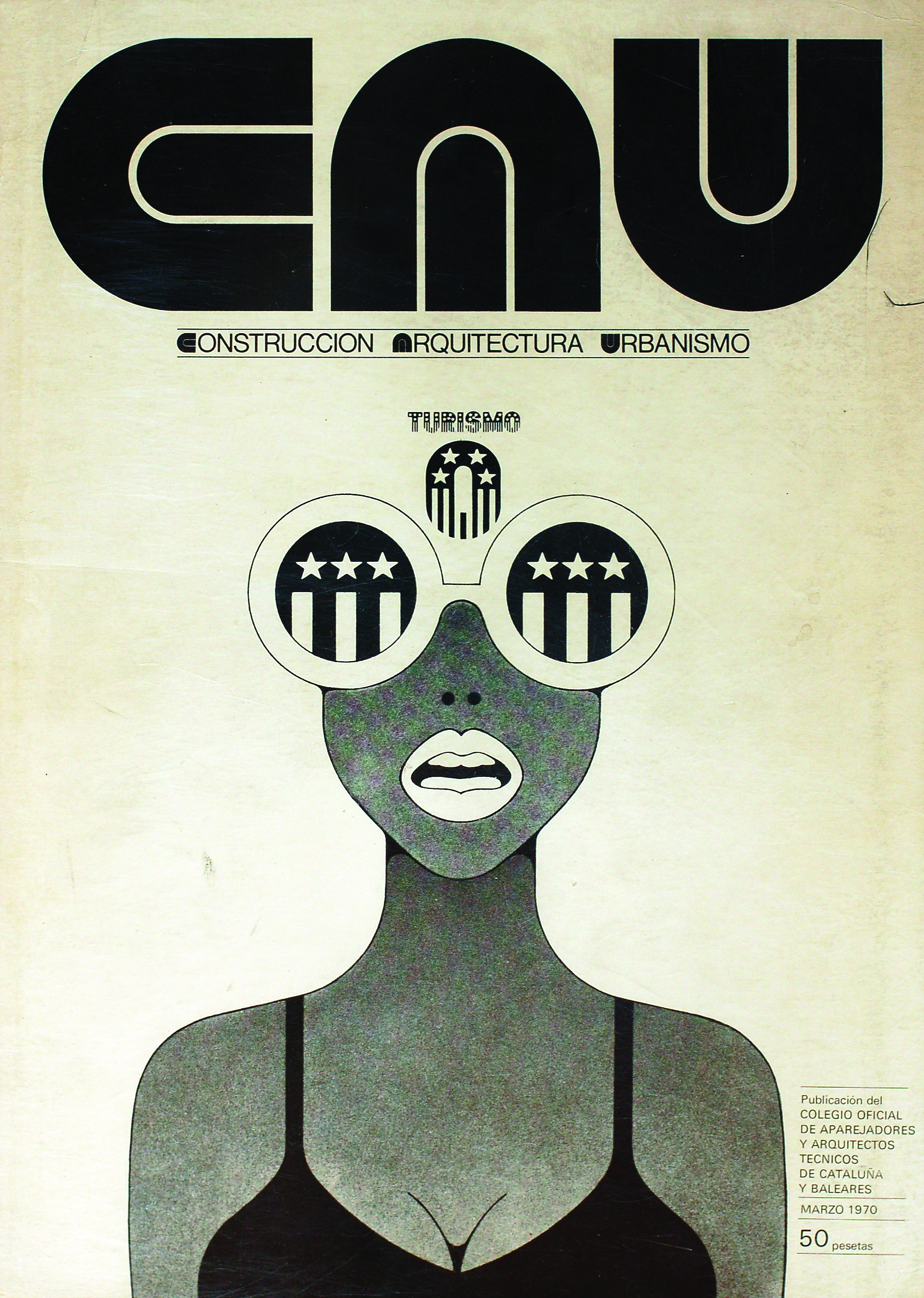 Coberta revista CAU març 1970